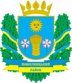 Герб Новоушицького району